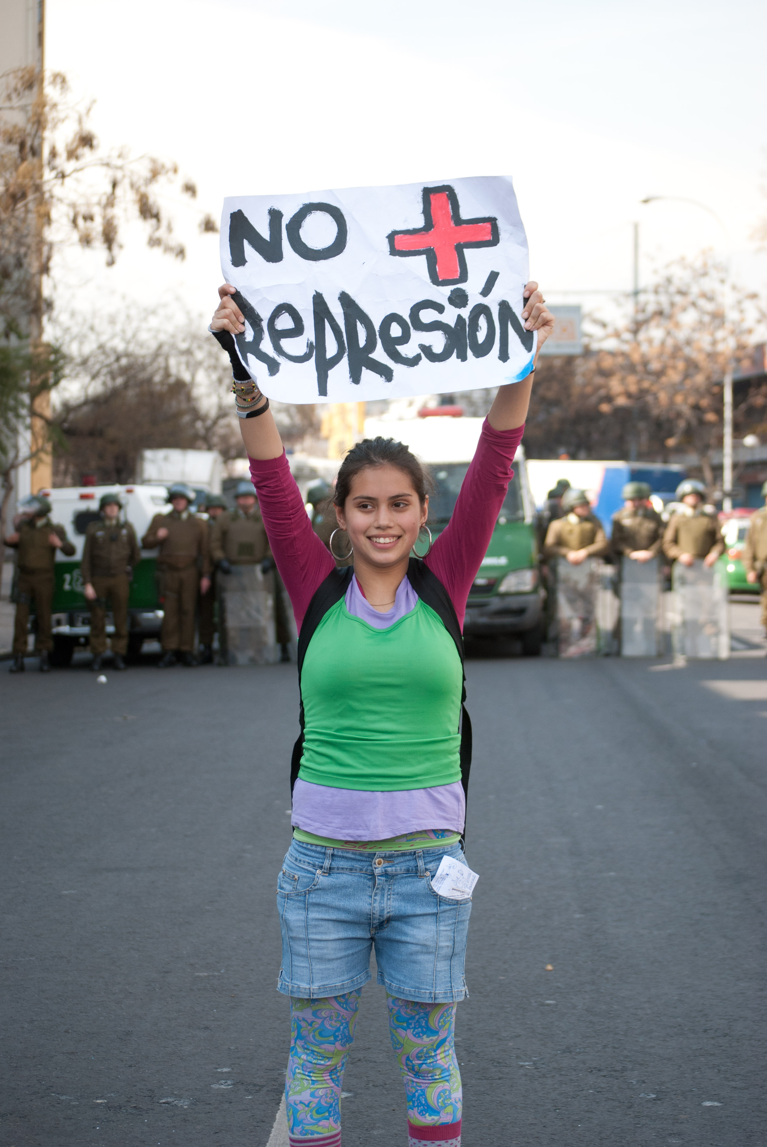 Participante en las movilizaciones estudiantiles de 2011 en Chile. "No más represión".